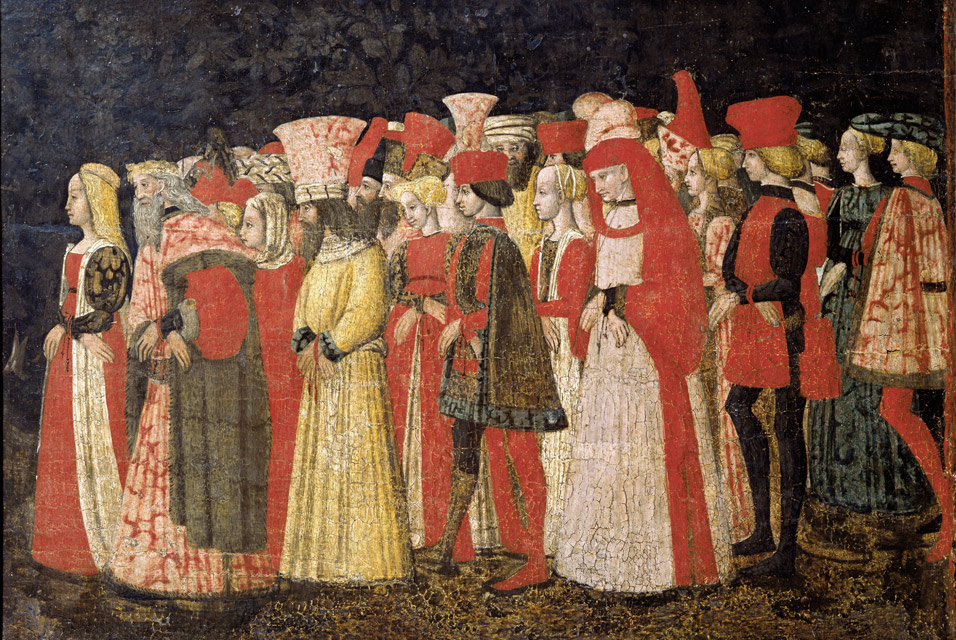 Love procession